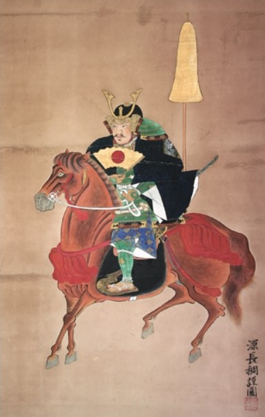 小笠原吉次の肖像。